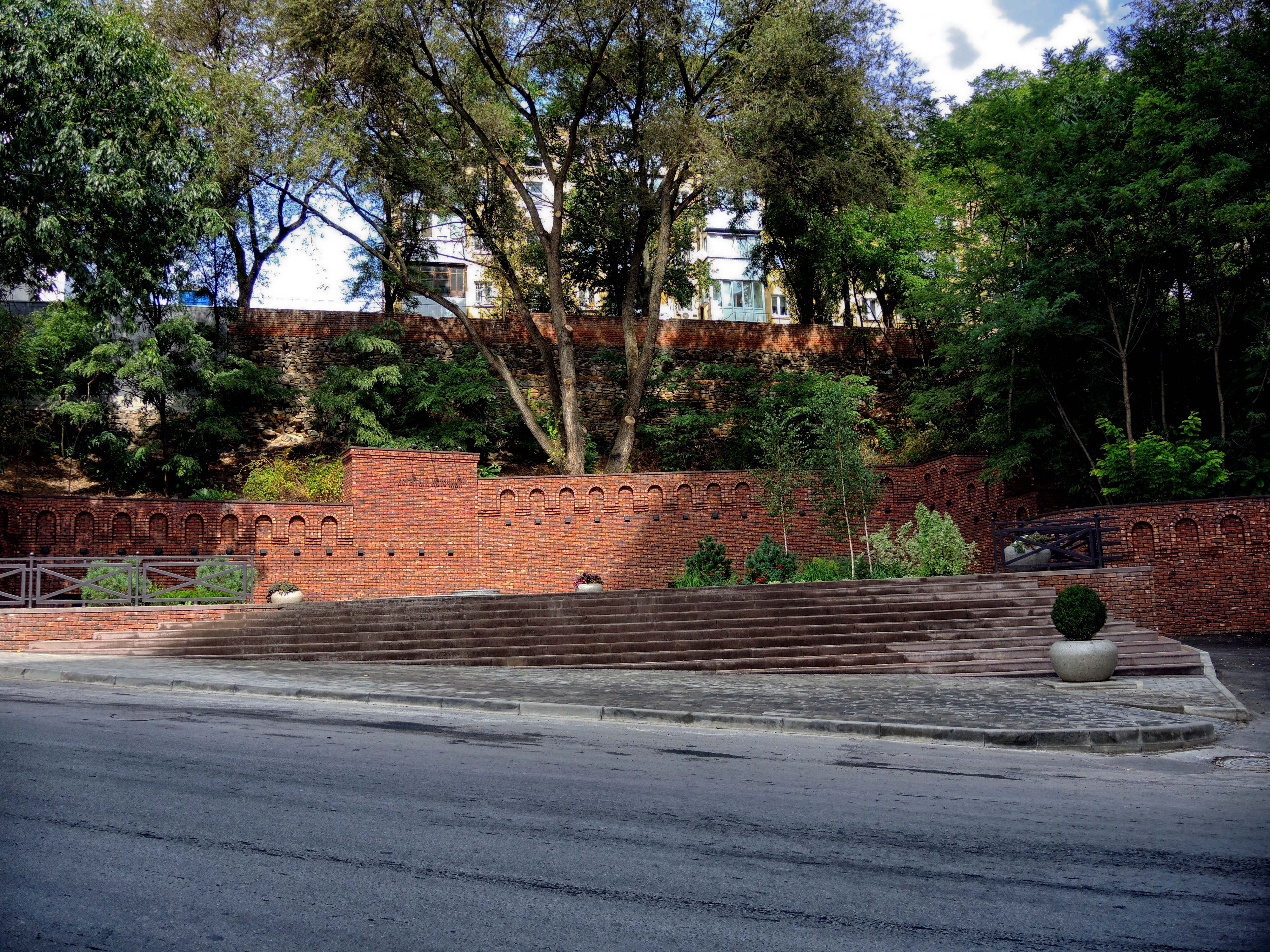 Богатый источник - место, связанное с основанием города: проспект Богатяновский спуск, 2В (слева от здания), Ростов-на-Дону, Ростовская область